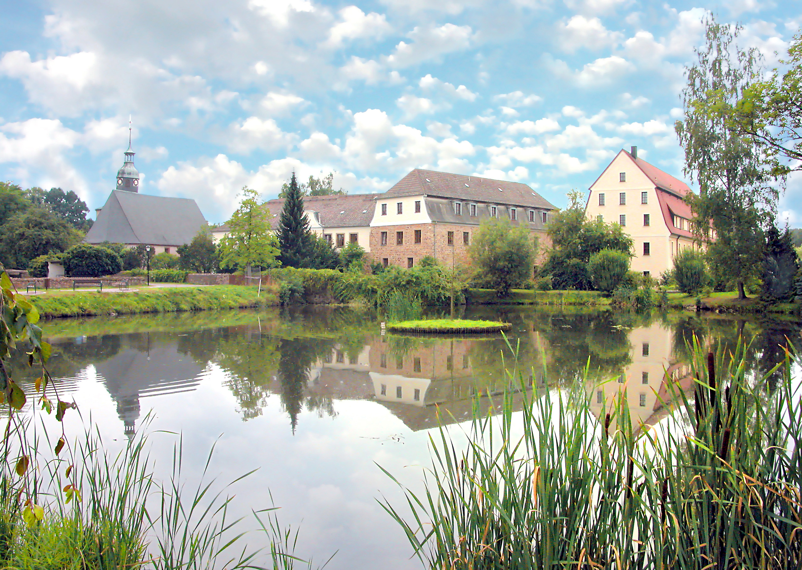 10.08.2006 04720 Mockritz (Gemeinde Großweitzschen): Blick über den Schloßteich zur Kirche, dem eigentlichen Schloß (16./17. Jh.) und rechts dem zum heutigen Herrenhaus ausgebautem Stall- und Speichergebäude (Kornhaus). [DSCN11048.TIF]20060810051DR(c)Blobelt